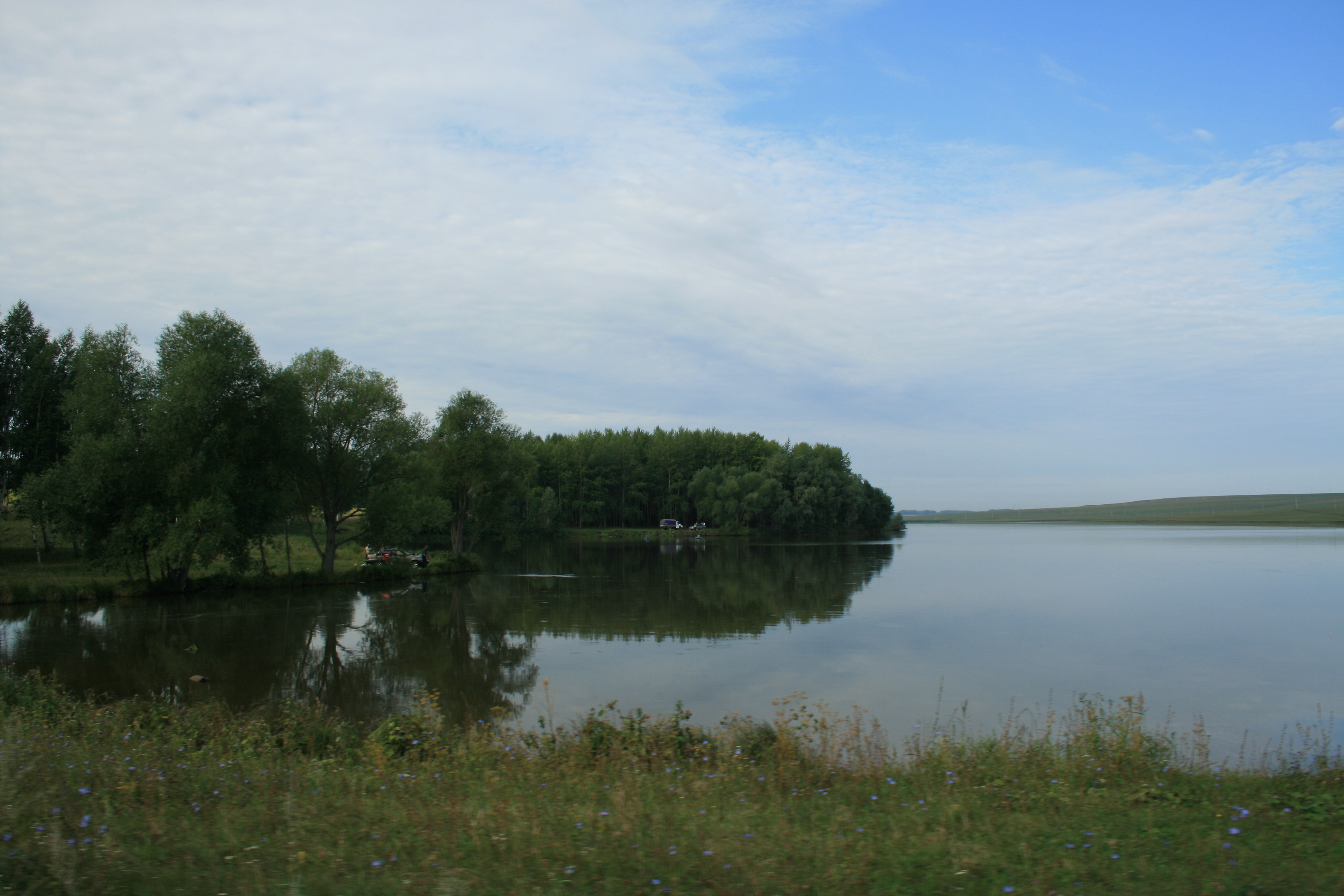 Lake near Starobashirovo